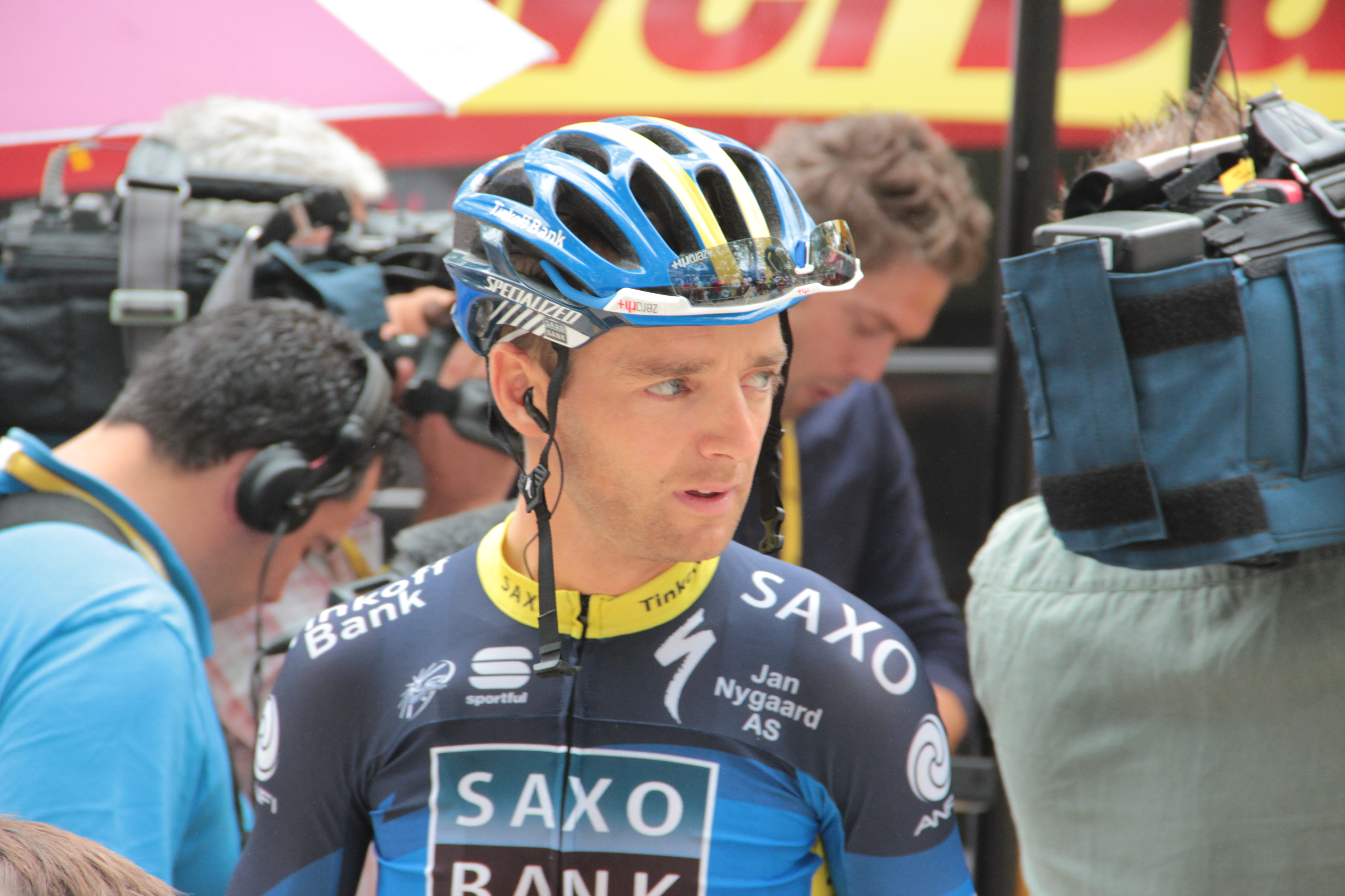 Karsten Kroon avant le départ de la 18e étape du Tour de France 2012.